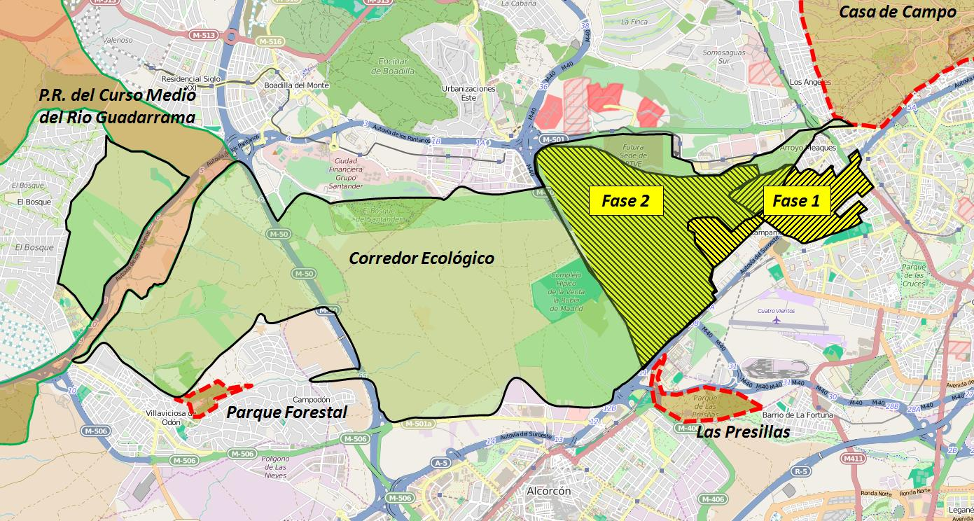 Corredor ecologico Casa de Campo Parque regional del rio Guadarrama y su entorno